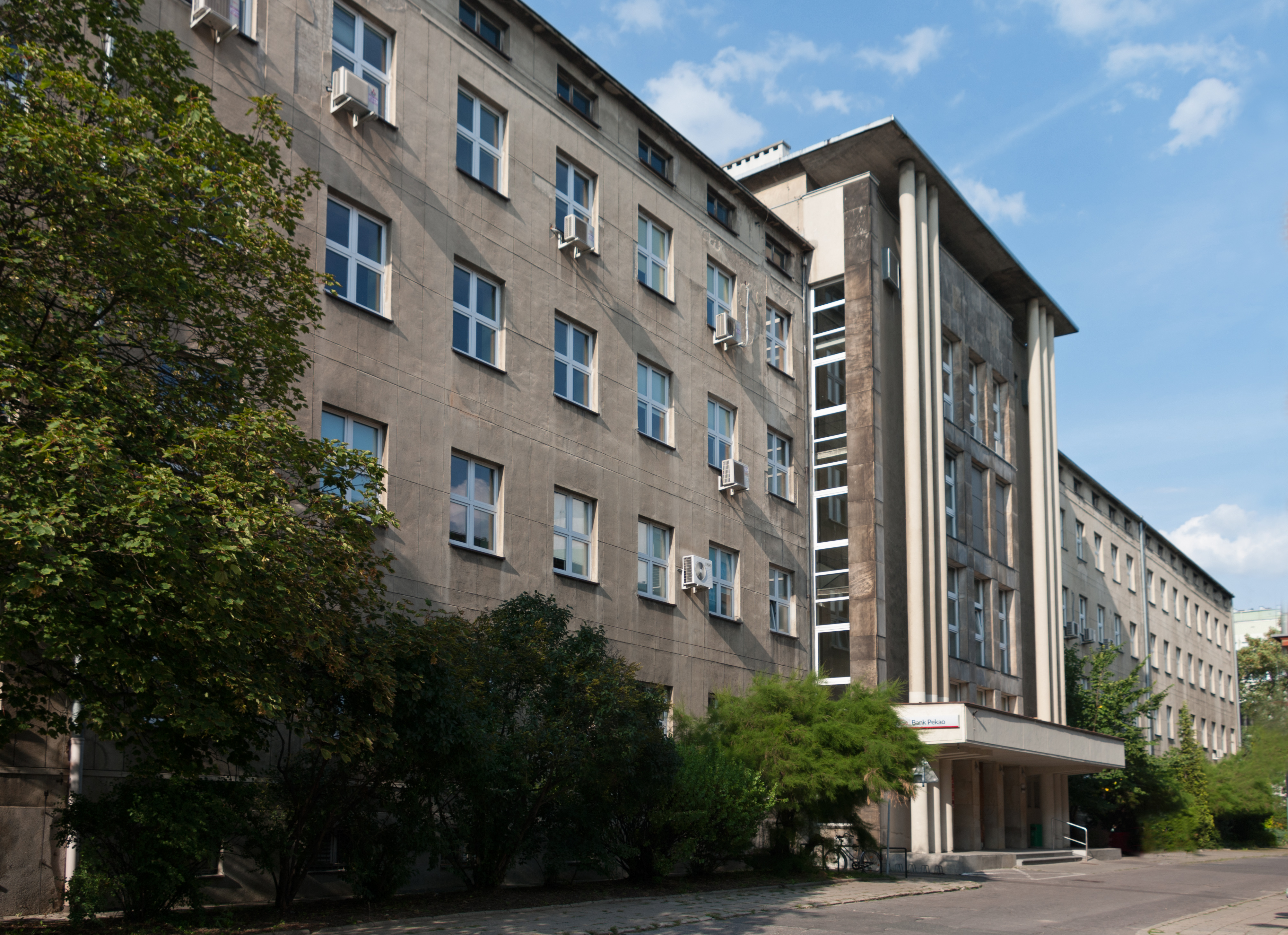 Gmach Wydziału Chemicznego Politechniki Łódzkiej